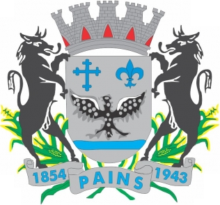 Brasão de armas do município de Pains, MG, Brasil.